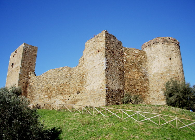 Veduta parziale della Rocca aldobrandesca (Rocca Pisana) di Scarlino